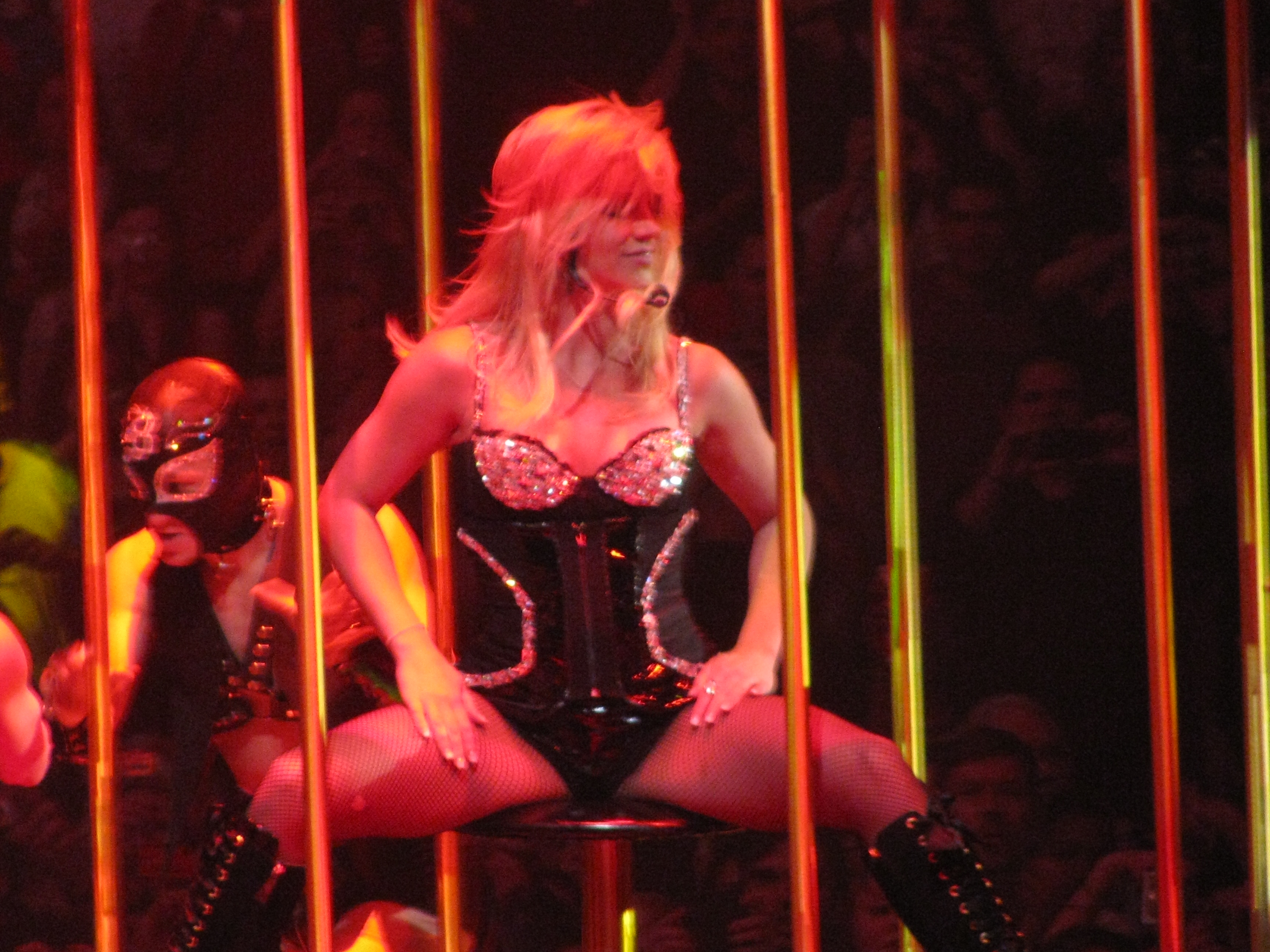 Cantando Piece Of Me en una "Carcel" Dorada